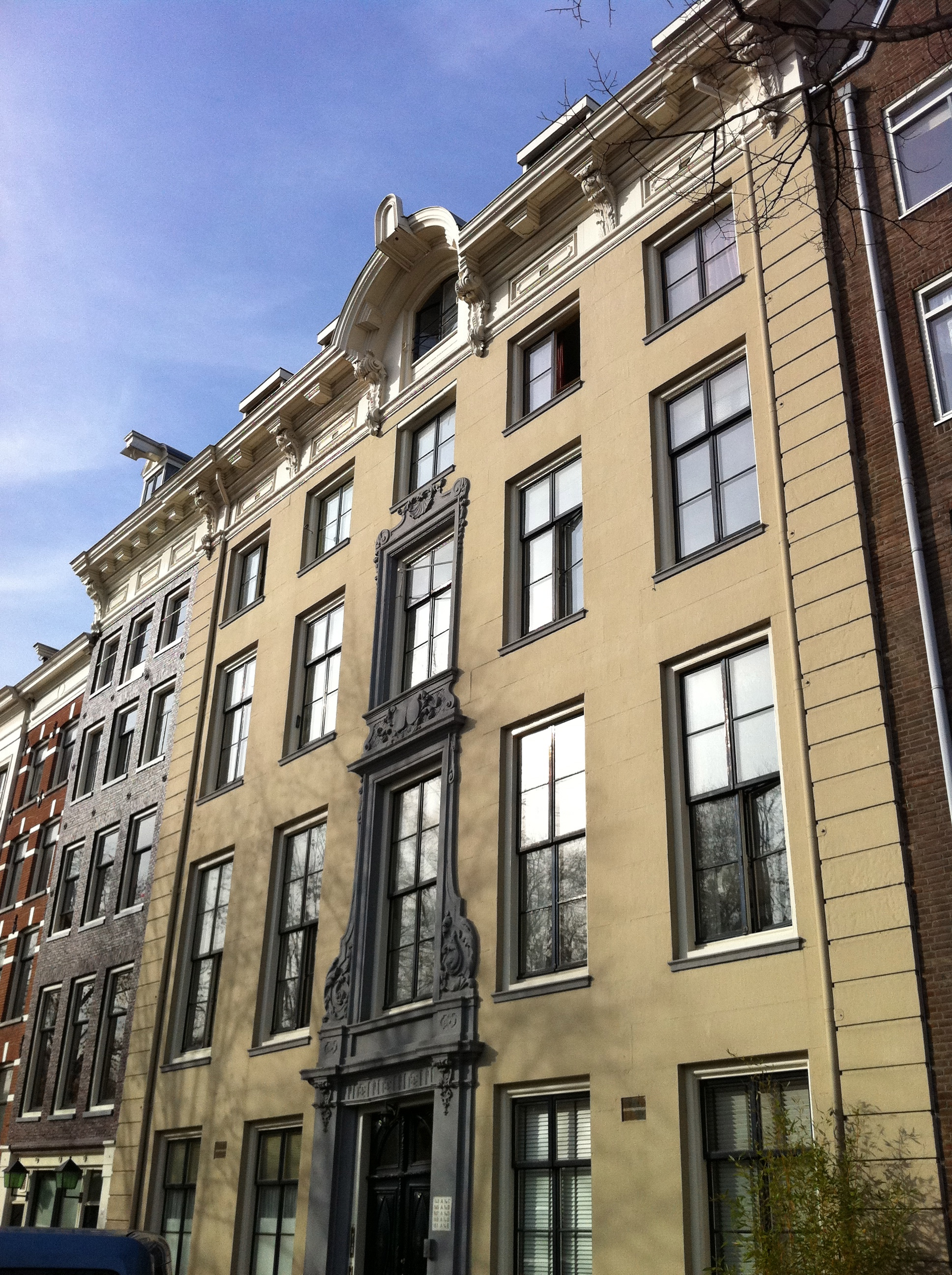 Amsterdam - Nieuwe Herengracht 143-151. Gekraakt in 1980 na anderhalf jaar leegstand. Begin jaren tachtig van de 20e eeuw aangekocht door de gemeente Amsterdam om te verbouwen tot jongerenhuisvesting met 20 zelfstandige HAT-eenheden. Dit kwam in overleg met de bewoners gereed in 1985-1986. Tegenwoordig verhuurd door woningcorporatie Ymere.